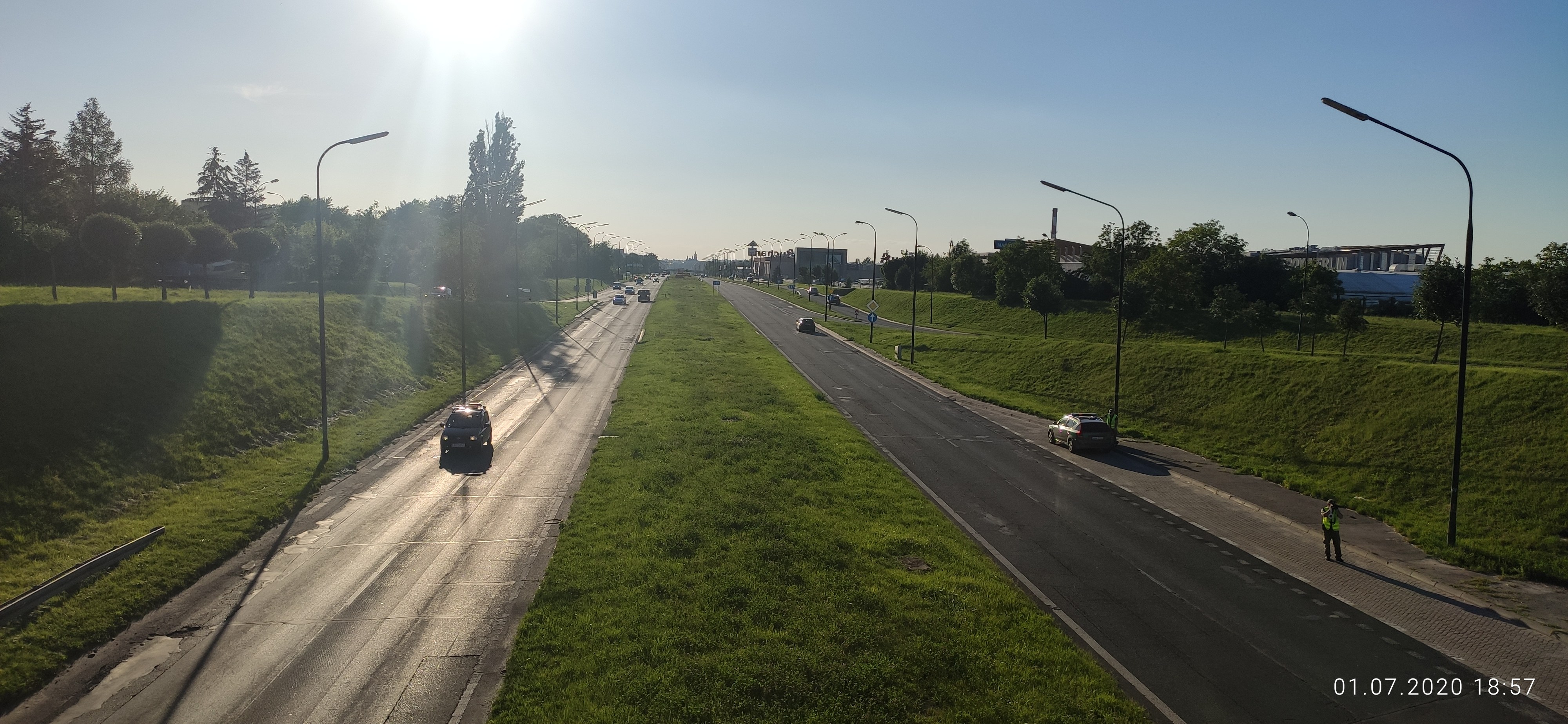 Widok na al. Witosa z Ronda przy Grygowej